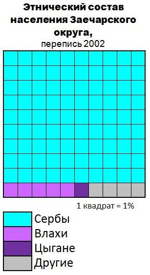 Этнический состав населения Заечарского округа (Сербия)